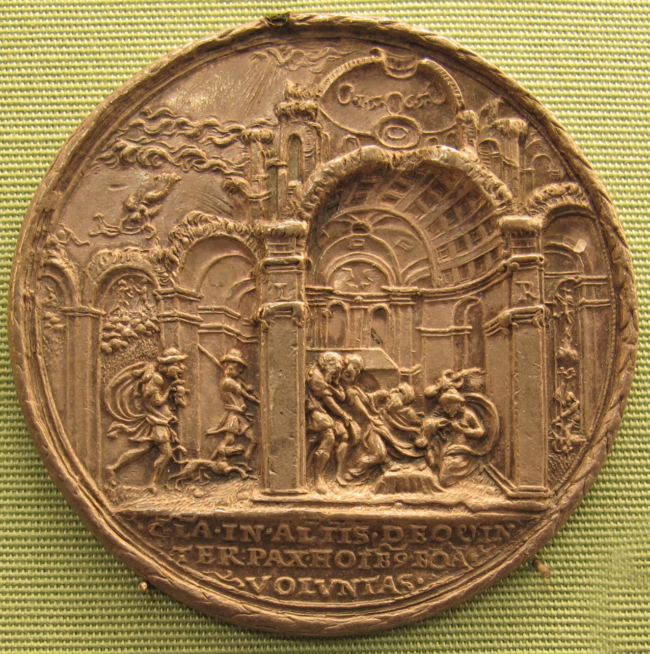 Lukas richter, natività, 1565